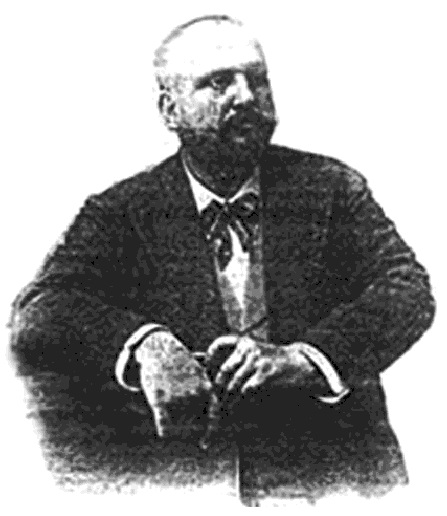 Patricio Delgado, Xan de Masma, militante carlista e escritor galego ( 1850-1900).